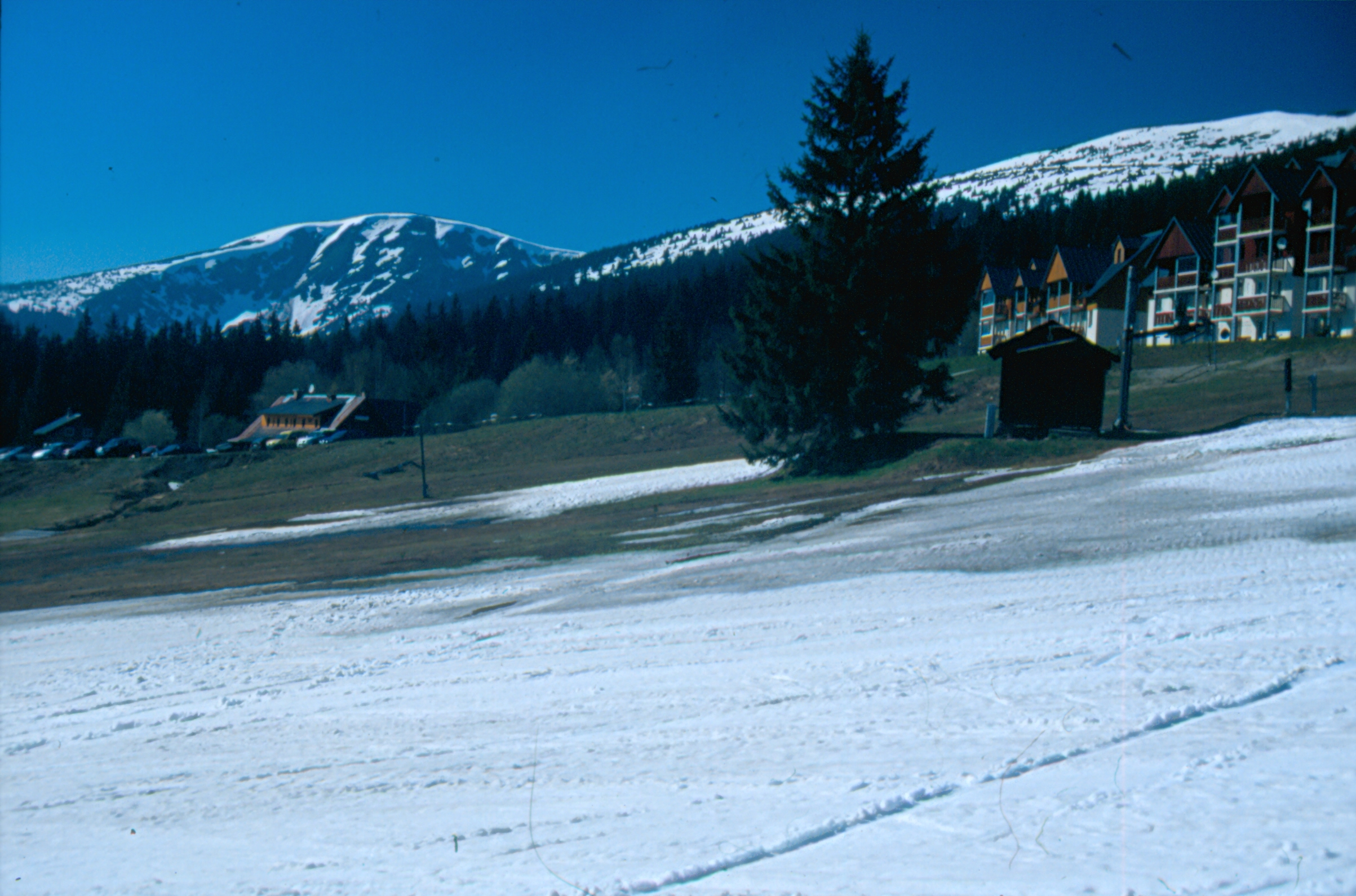 Kotel von Horni Misecky